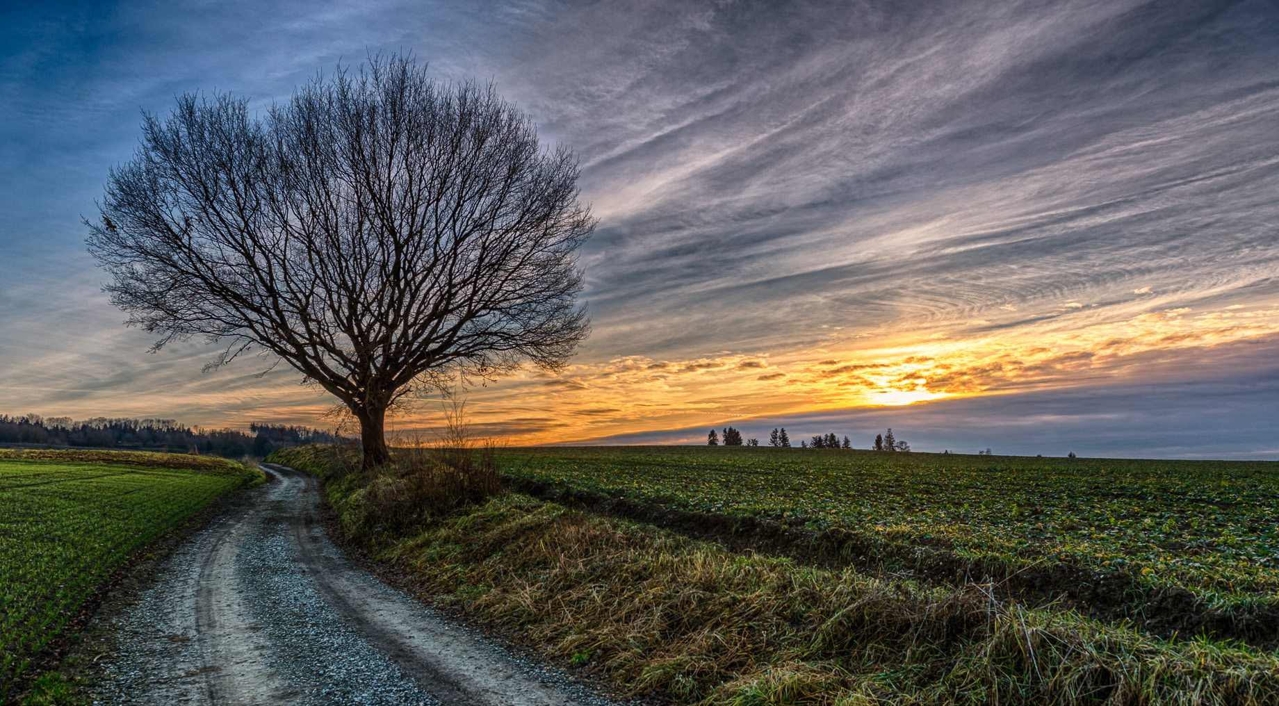 Einzelner Baum auf dem Feld in Neusäß gegenüber Am Kobelgraben 12, Naturdenkmal, Bayern